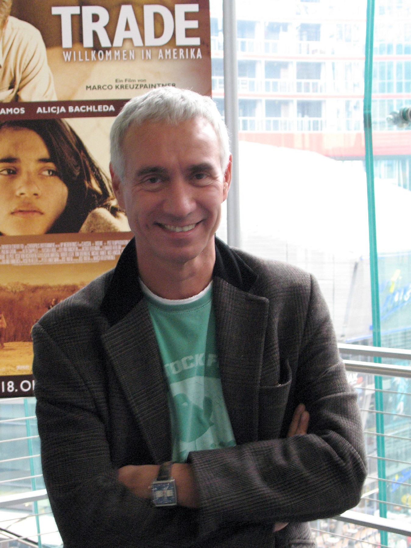 Roland Emmerich nach der Pressekonferenz zur deutschen Filmpremiere Trade, Berlin, 11.10.2007